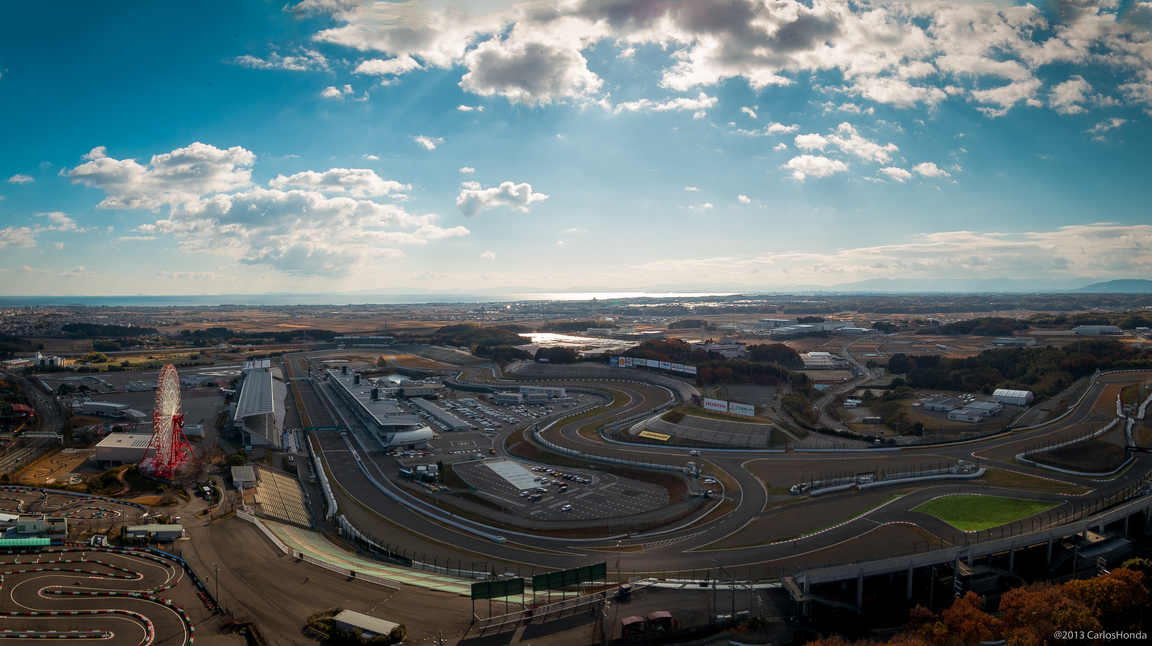 Aéreo do Circuito de Suzuka e arredores